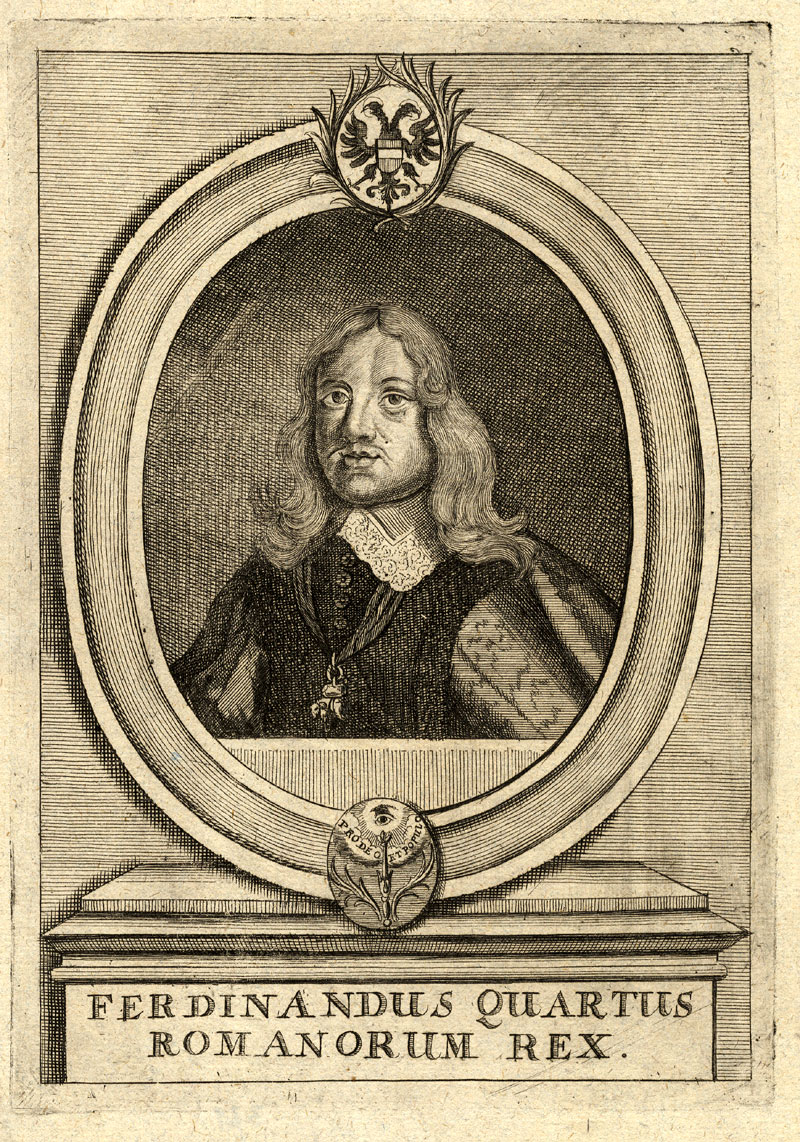 Porträt Ferdinand IV., röm. König, Kupferstich; Ende 17. Jh.